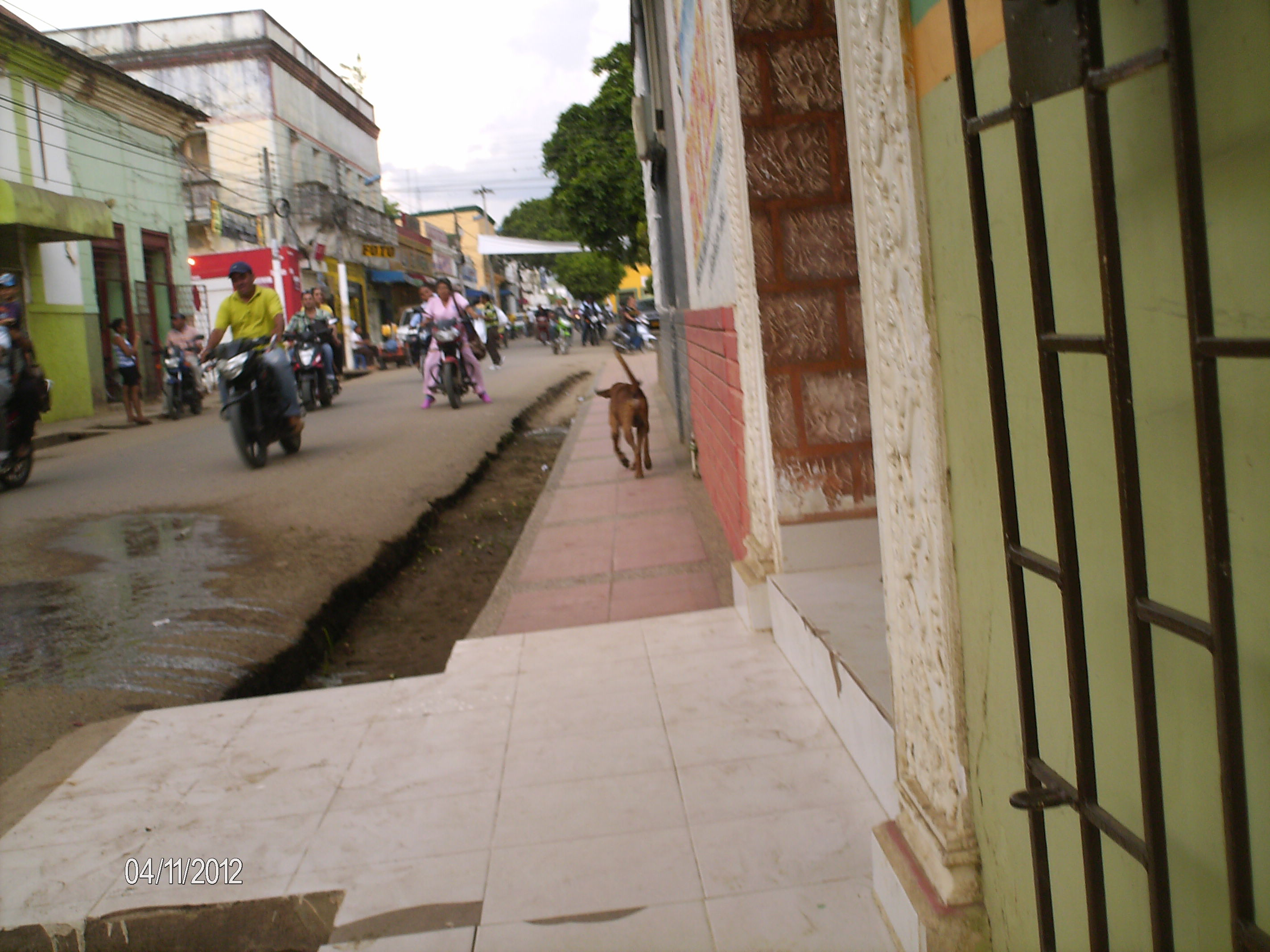 El Carmen de Bolívar, El Carmen de Bolivar, Bolivar, Colombia